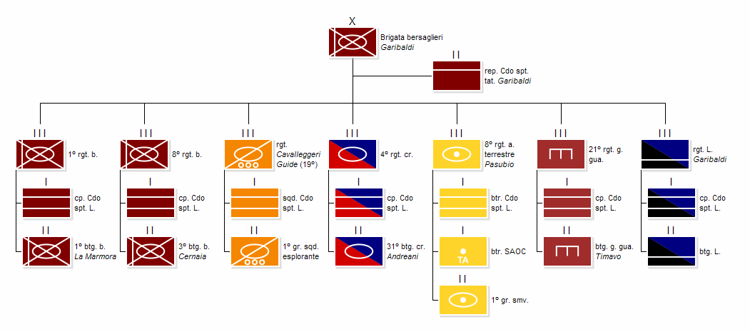 Attuale struttura della Brigata "Garibaldi"